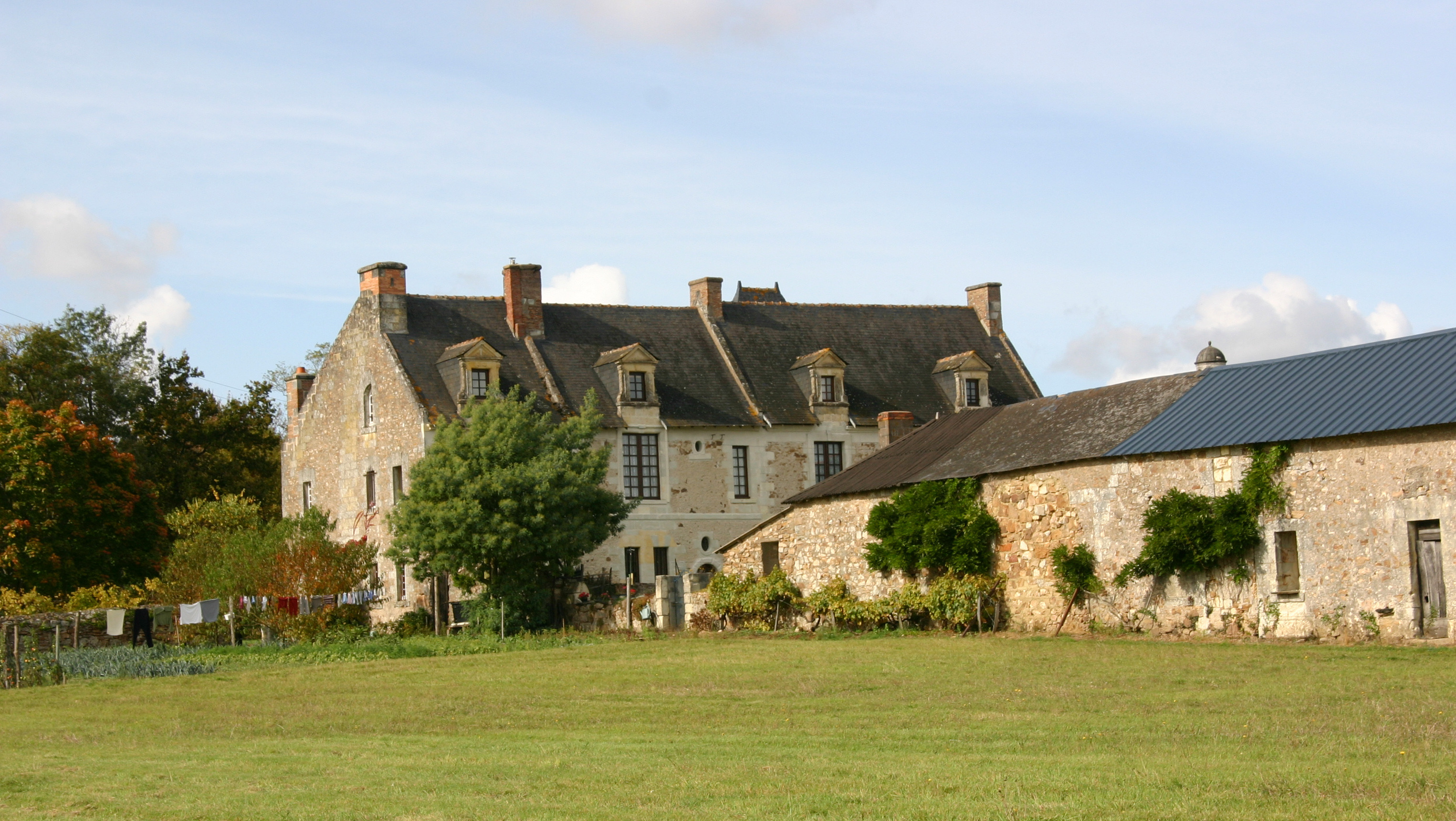 Blaison-Gohier